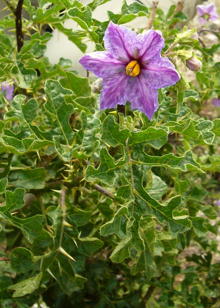 Solanum linnaeanum (Sodomsapfel) mit 6 Kronblättern